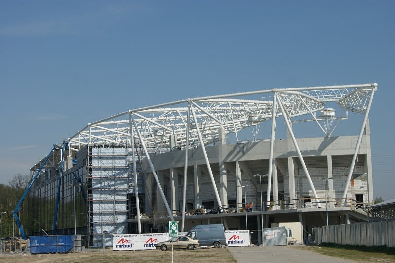 Budowa stadionu miejskiego w Łodzi 2015